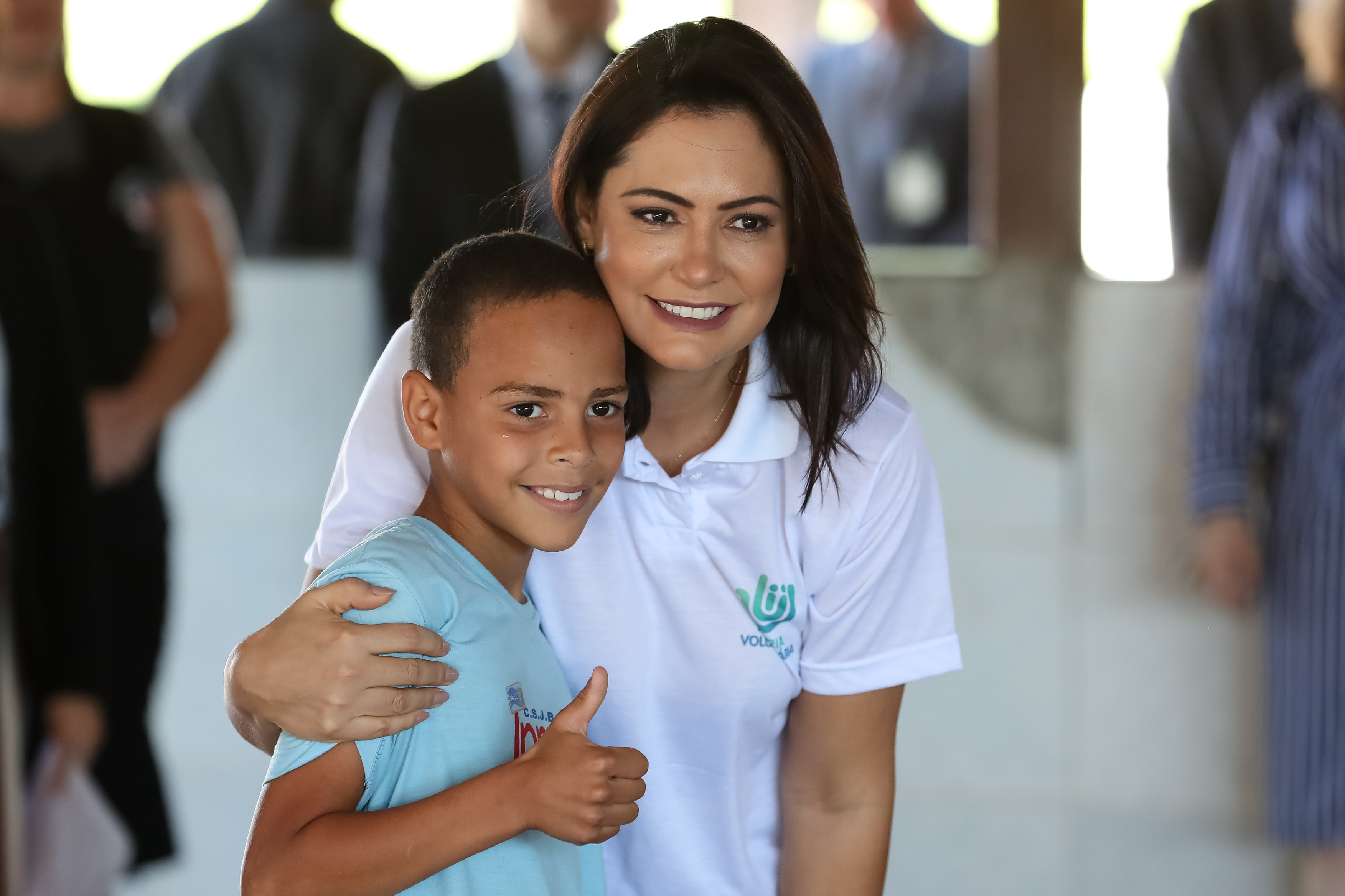 (Brasília - DF, 16/12/2019) Presidente da República, Jair Bolsonaro e a Primeira-Dama Michelle Bolsonaro, durante visita ao Instituto Promocional Madalena Caputo